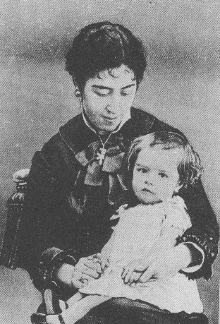 Carme de Sojo i Ballester amb un dels seus fills